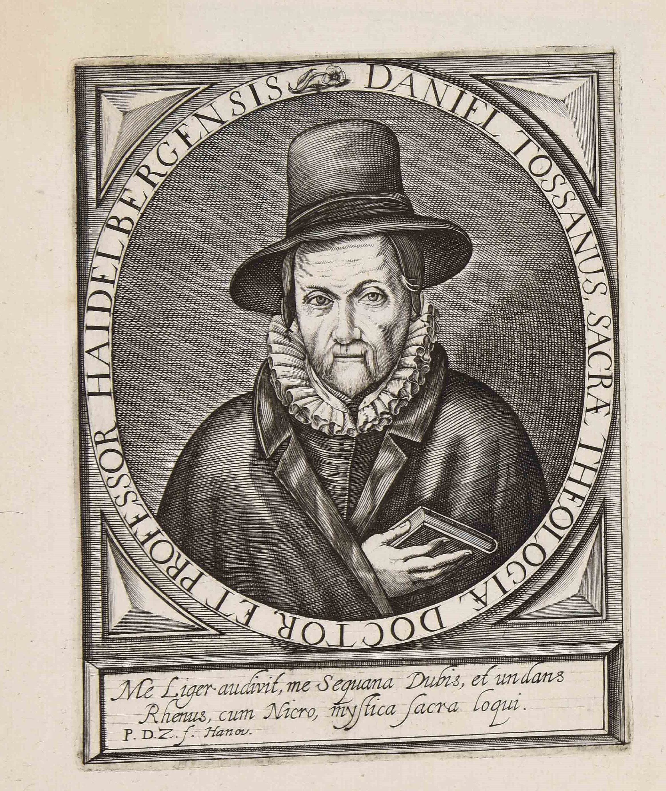 Calcografia in Jean Jacques Boissard, Bibliotheca sive Thesaurus virtutis, Frankfurt am Mein: William Fitzer 1627. Esemplare GI 1 v. c 41 della Biblioteca comunale di Trento, che presenta aggiunte successive.